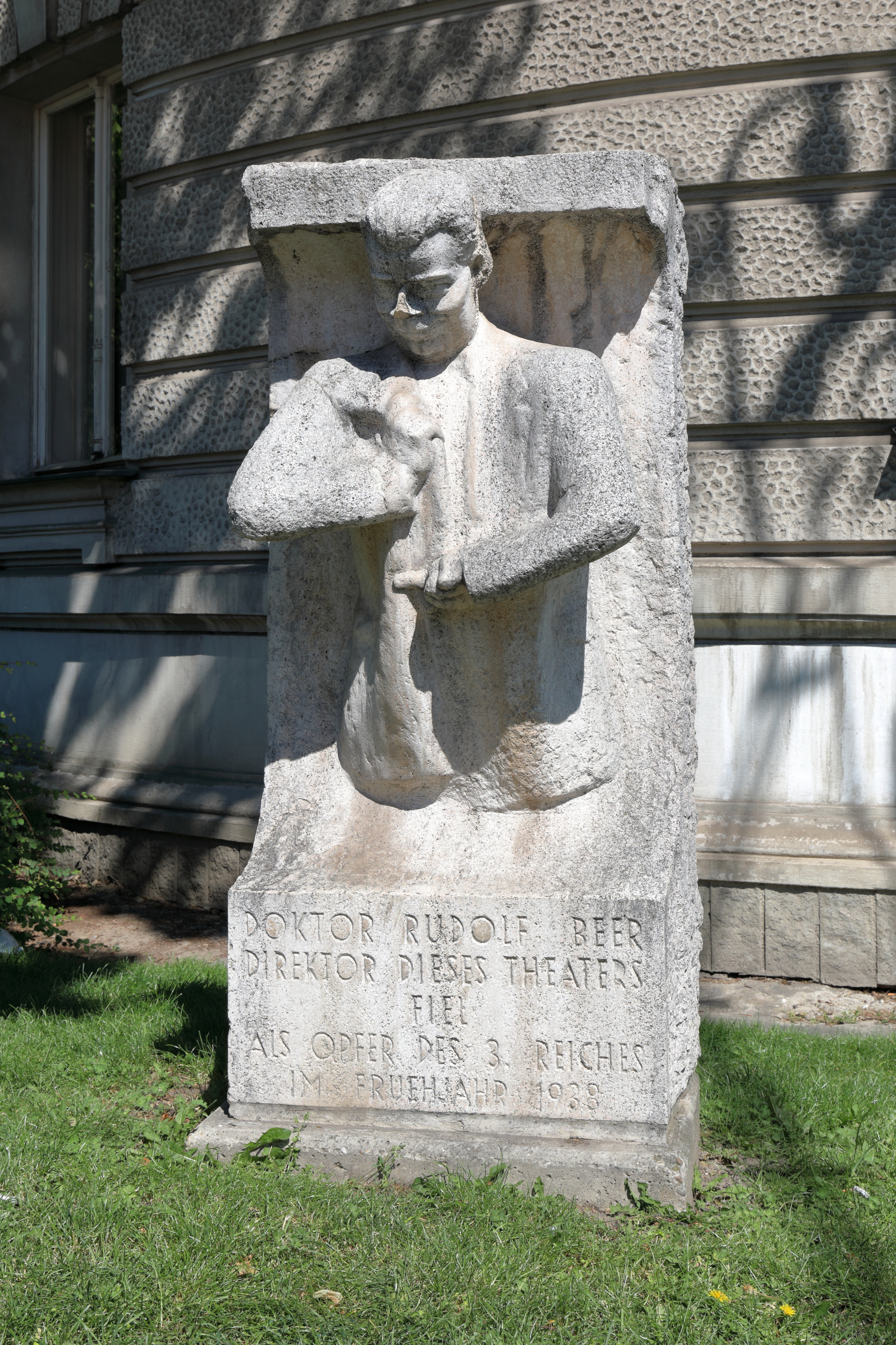 Das Dr.-Rudolf-Beer-Denkmal südseitig des Volkstheaters im 7. Wiener Gemeindebezirk Neubau. Das Denkmal erinnert an den früheren Direktor des Deutschen Volkstheaters Rudolf Beer (1924-1932), der nach dem Einmarsch der deutschen Truppen 1938 sich das Leben nahm. Die Büste ist ein älteres Werk von Franz Pixner. Nach der Restaurierung wurde sie mit einem Sockel versehen, versetzt und am 12. März 2008 neu enthüllt.